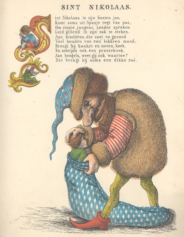 Tante Keetje's prentenboek / Tante Keetje. - Zwolle : H.L. van Hoogstraten, [1854]. - [20] bl. : gekl. ill. ; 28 cm Op titelpagina: Kleurendruk van H.L. van Hoogstraten. Voorplat met afbeelding in zwart. - Bewerking van: Pocci's lustiges Bilderbuch / Franz Pocci.- München, 1852